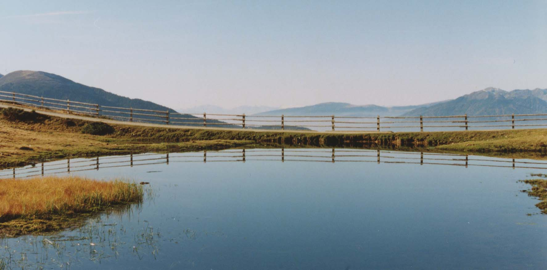 Gebirgssee auf der Rodenecker Alm in Südtirol.